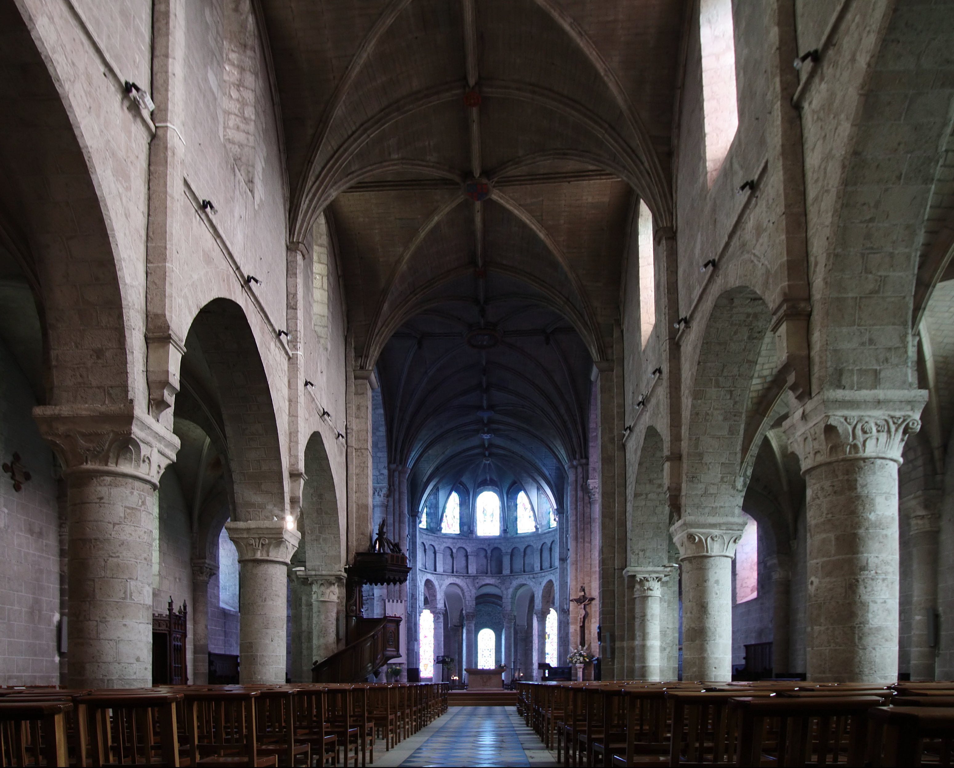 Beaugency, Ortschaft im Département Loiret/Frankreich - Inneres der Kirche Notre-Dame aus dem 12. Jahrhundert.